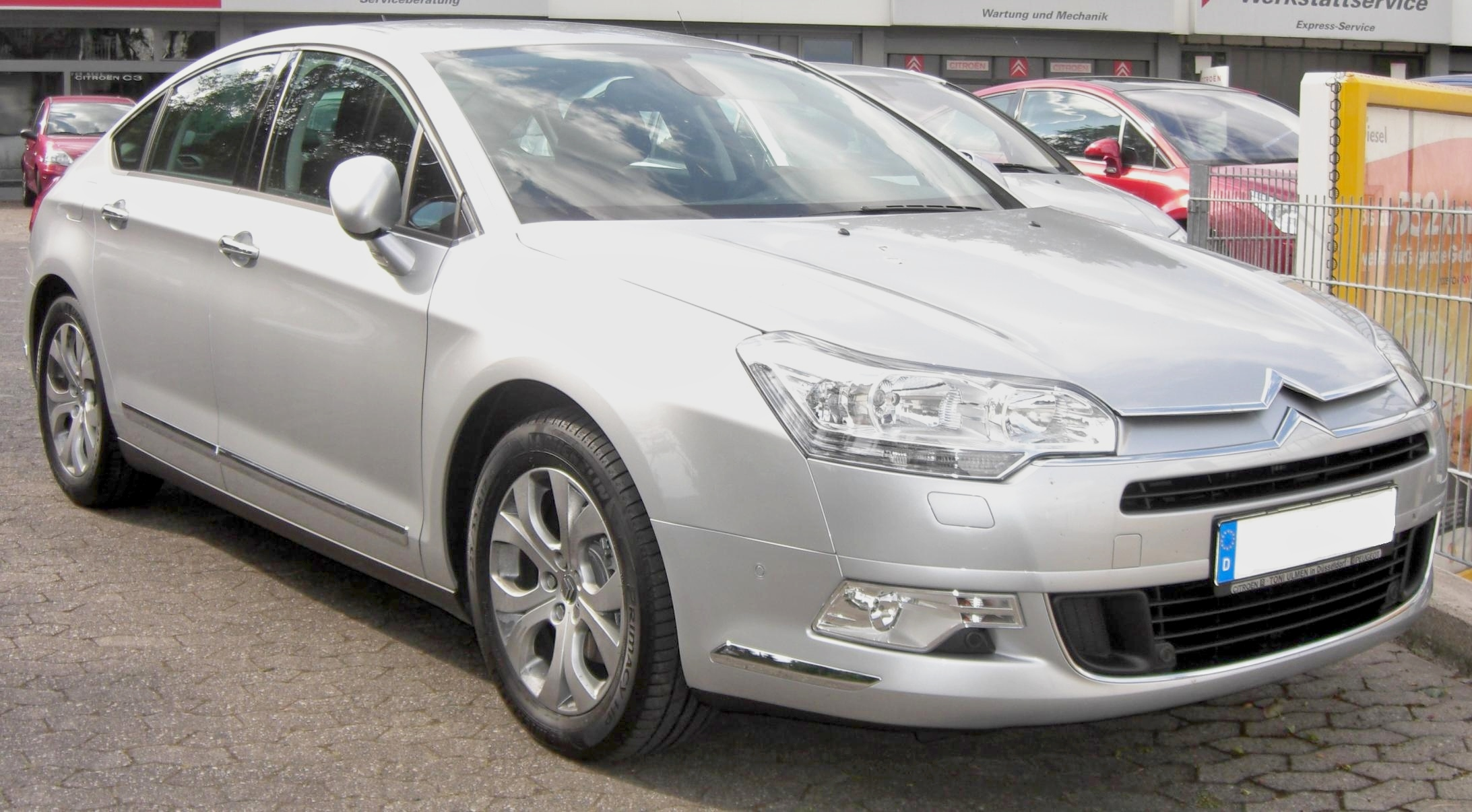 Citroen C5